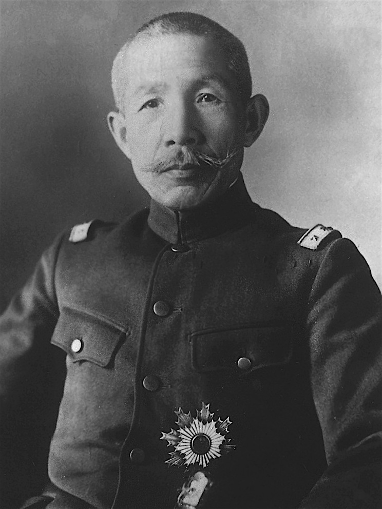 Portrait of Araki Sadao (荒木貞夫, 1877 – 1966)